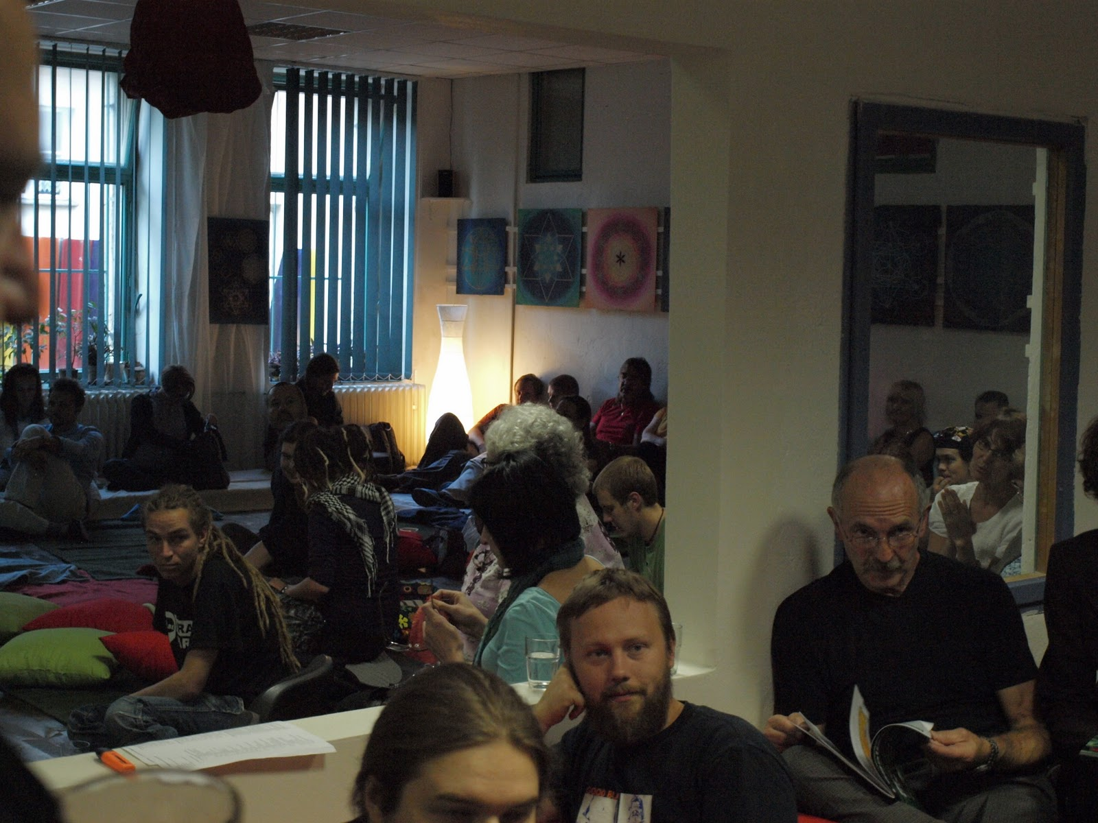 Slavnostní zahájení otevření všech provozů Edukativní konopné kliniky v Praze na Žižkově dne 11.9.2010